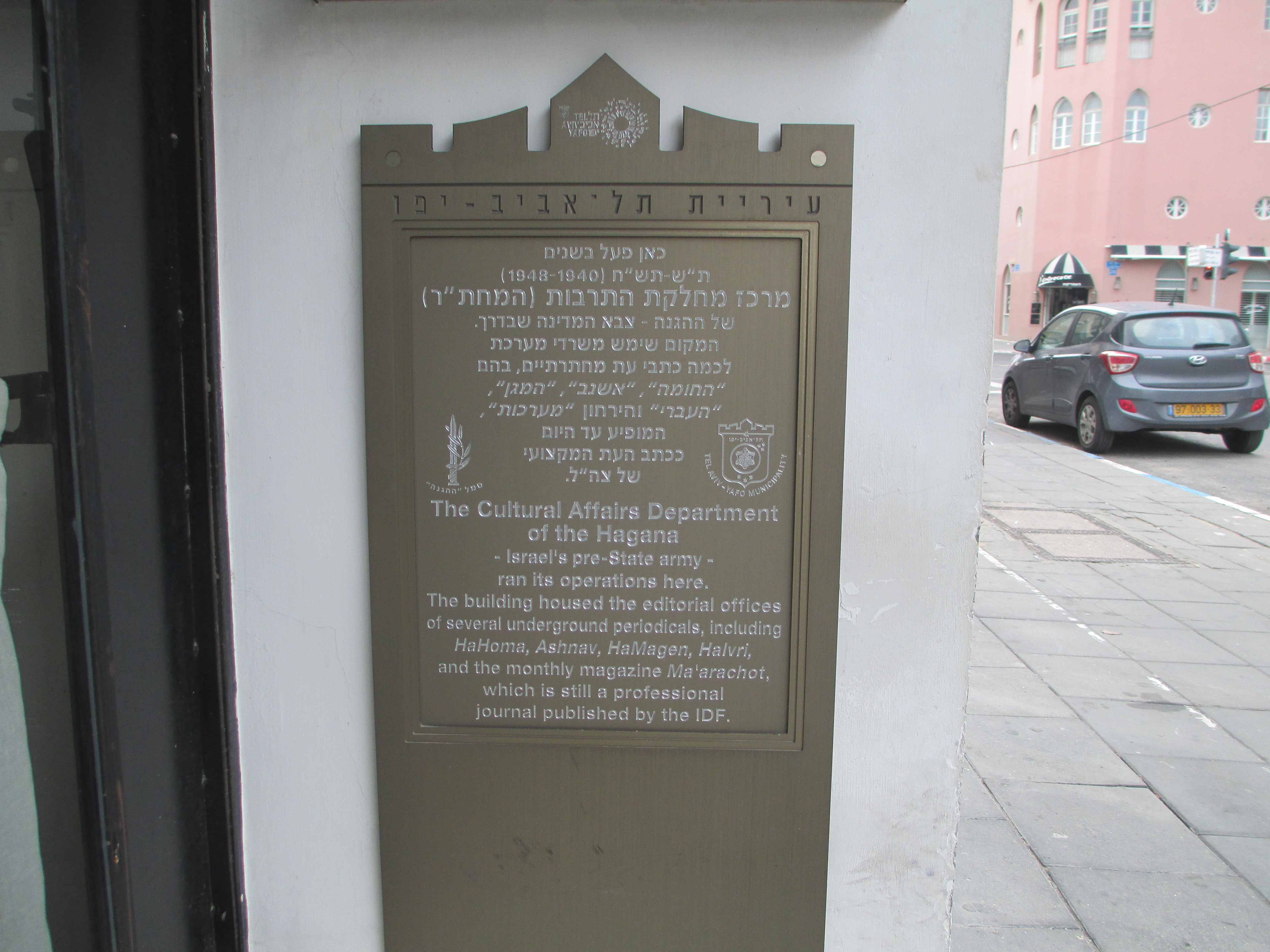 שלט זיכרון של מחלקת התרבות של ההגנה ברחוב נחלת בנימין 57 בתל אביב